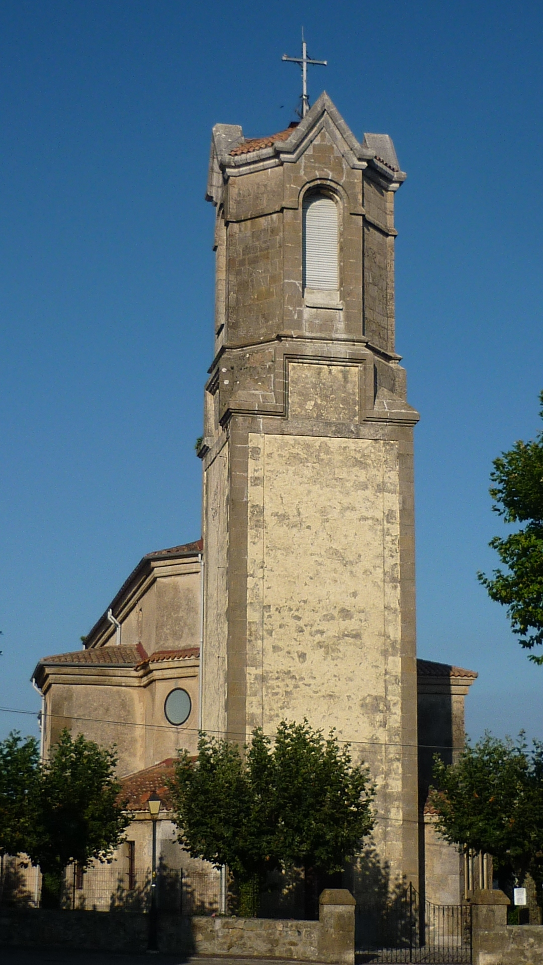 Church Mortera